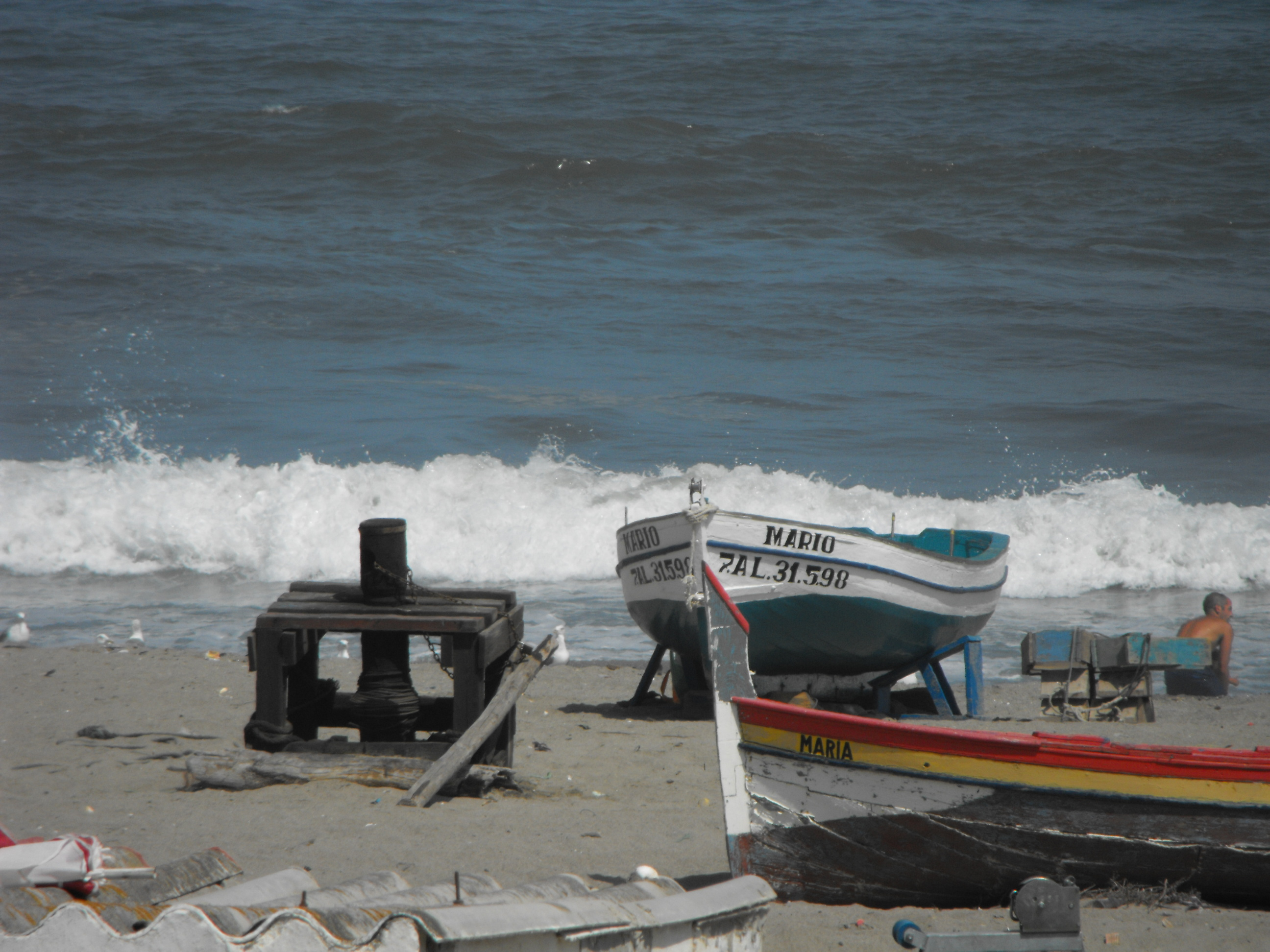 Litoral del barrio de la Atunara tipicamente marinero y pesquero.